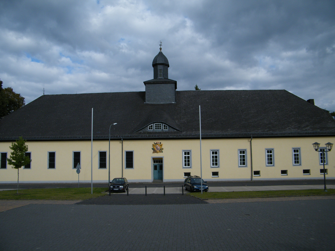 Kirche (linke Seite) in Welschneudorf, Versammlungsraum (mitte: grüne Tür) und Kurfürstenhalle (rechte Seite)